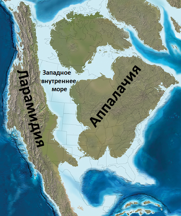 Карта Северной Америки и Западного внутреннего моря 75 млн лет назад, в конце кампанского века (около 11 млн лет до окончания мелового периода).